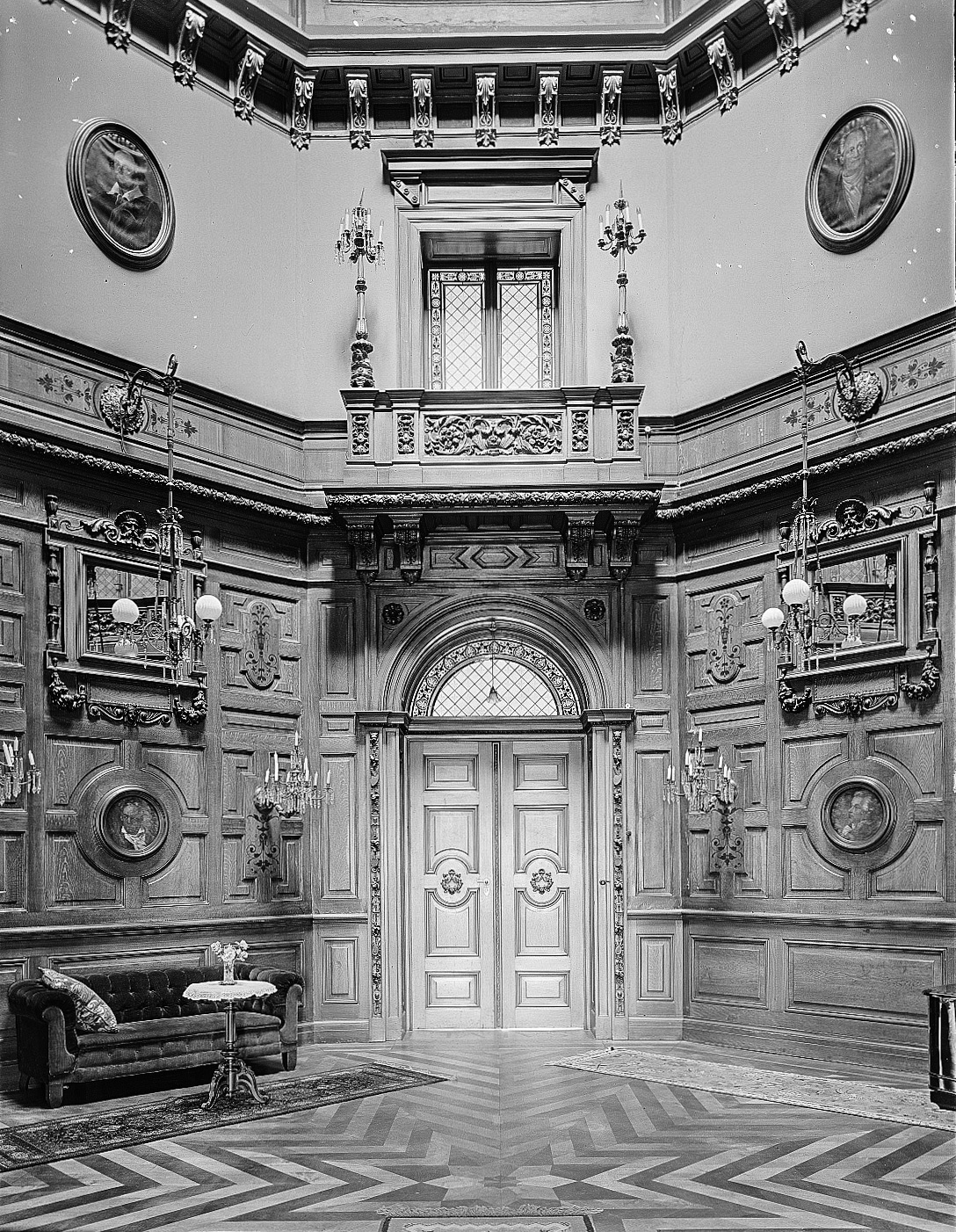 Villa Rosa, Innenansicht des achteckigen Salons (Diele). Historisches Foto, Datierung 1838-1839